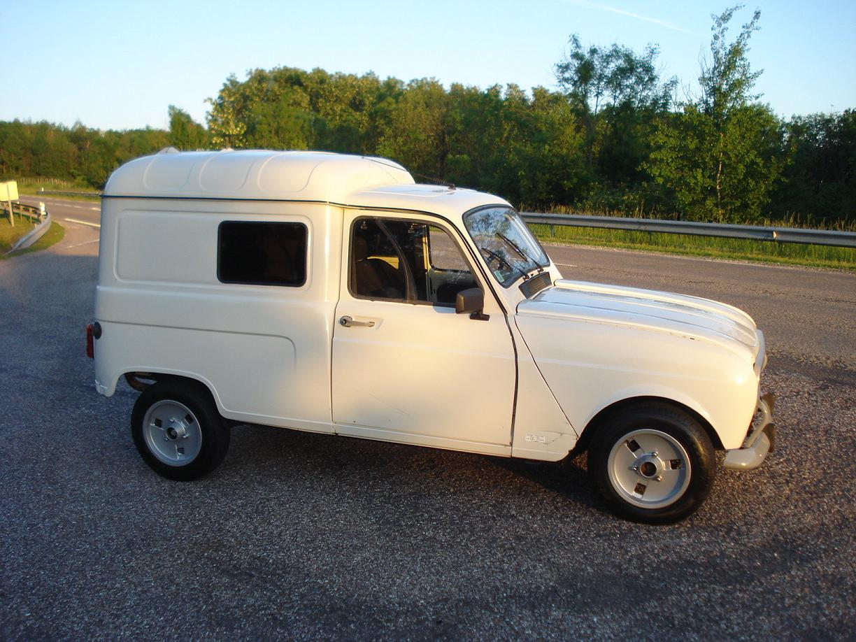 Profil droit renault 4 F4 (les jantes proviennent d'une Renault 5 Alpine)